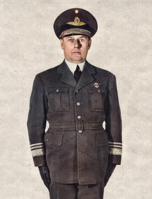 El Brigadier General Oscar Muratorio.